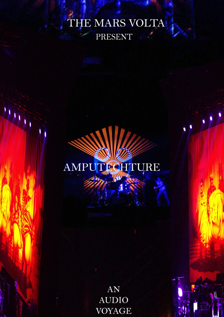 Amputechture Advert 2